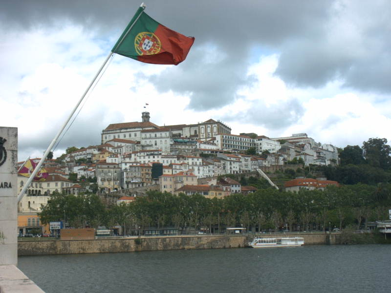 Coimbra desde el puente del río Mondego. Fotografía realizada por: Ángel Serrano Sánchez de León